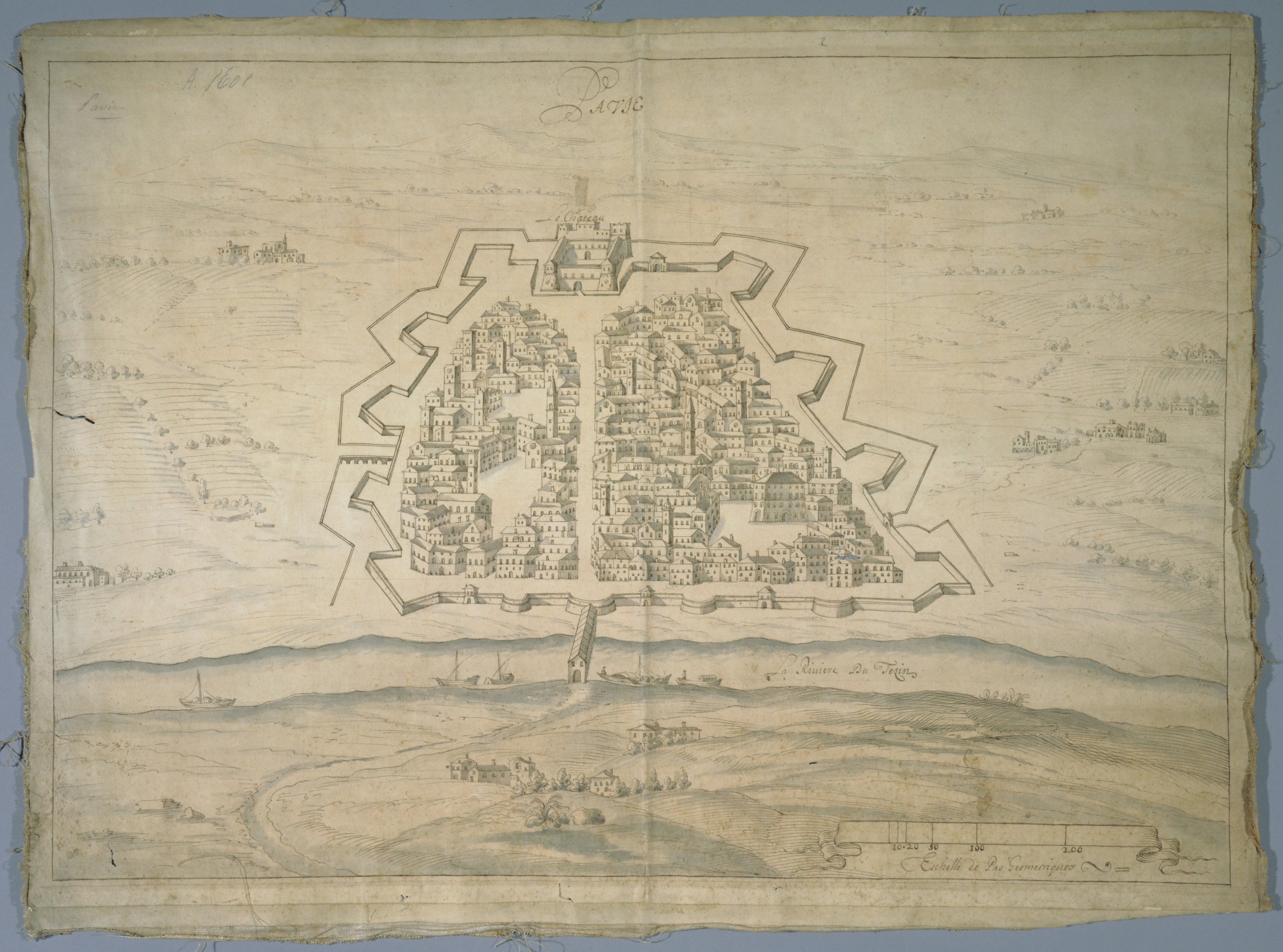 Plan de la ville et des fortifications de Pavie, XVIIe siècle